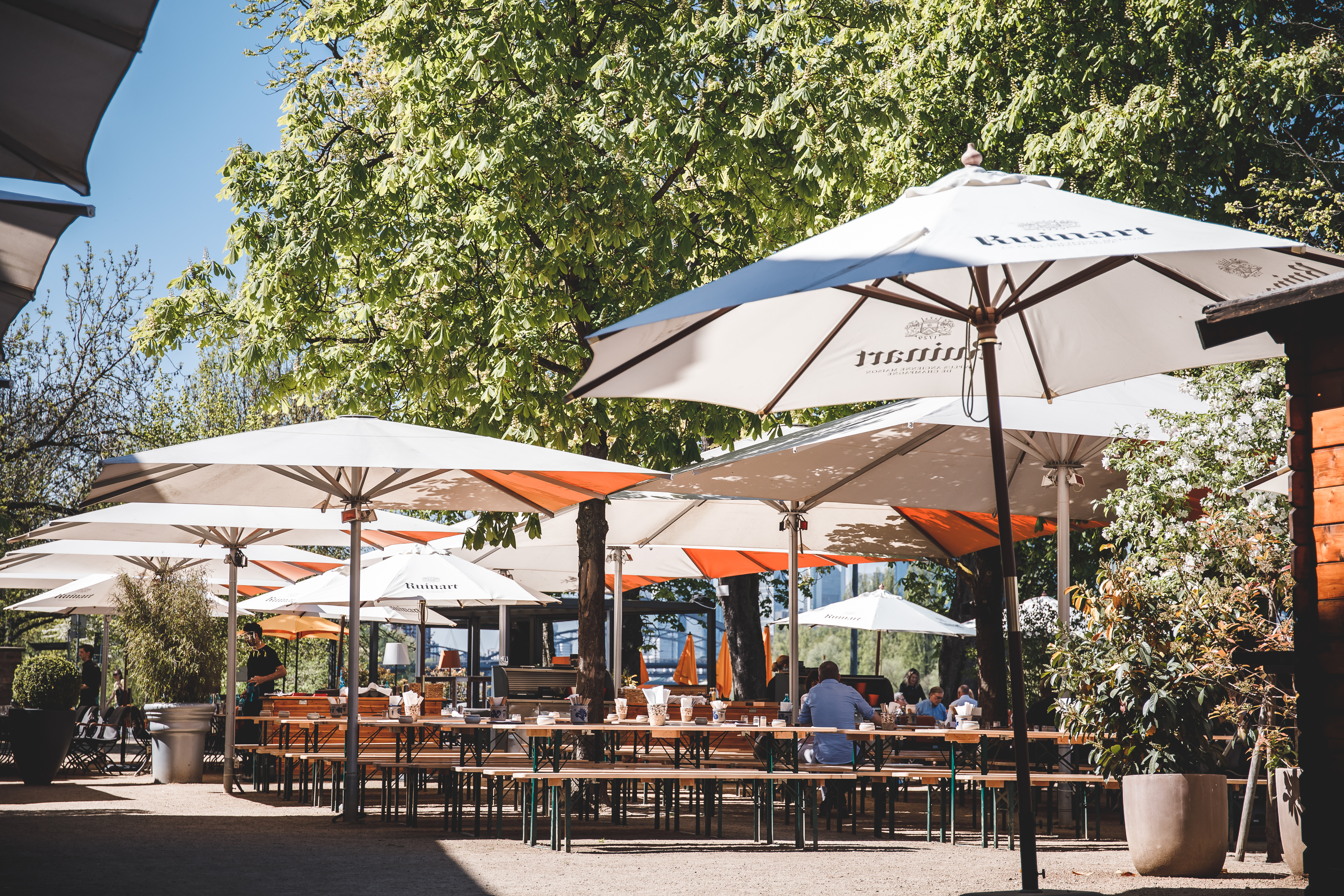 Biergarten und Restaurant (2018), im Hintergrund Main und Skyline Frankfurts.